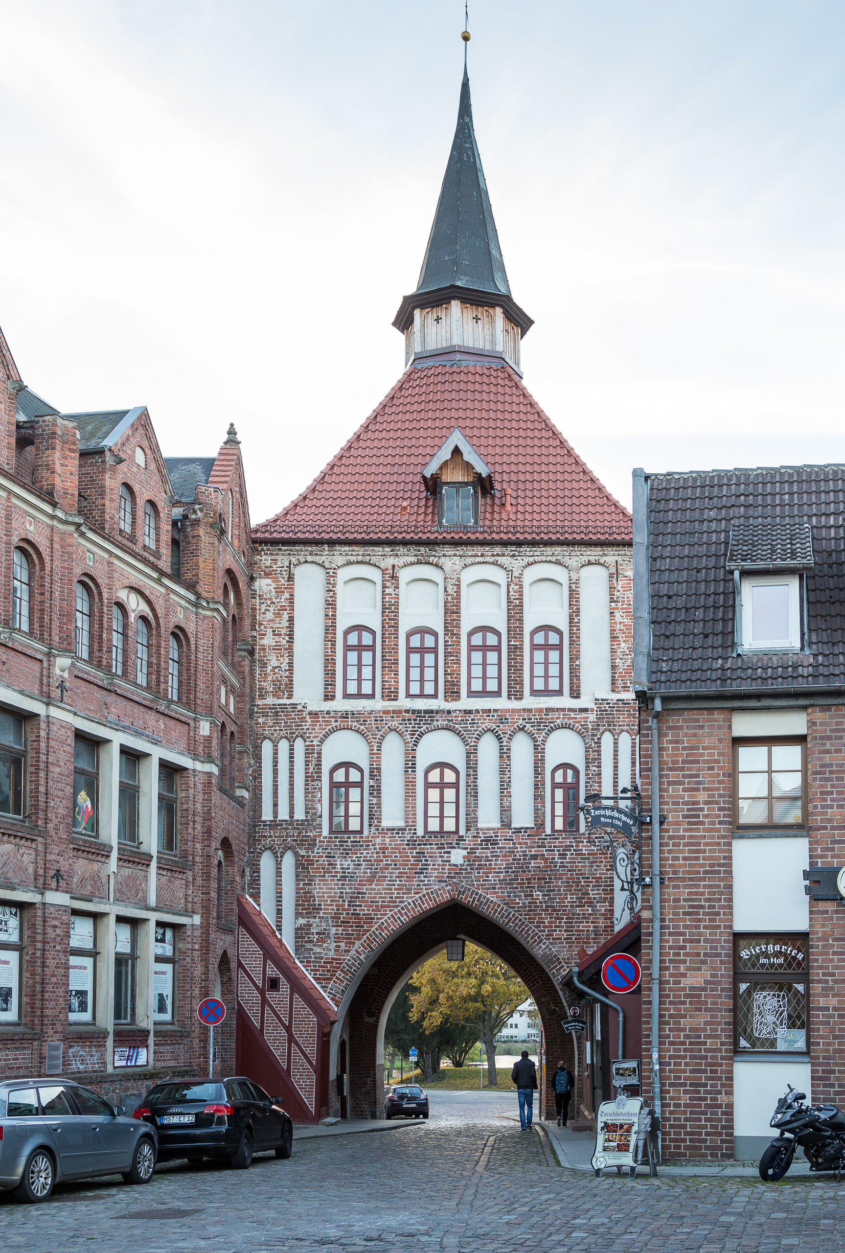 Stadtausgang Kütertor